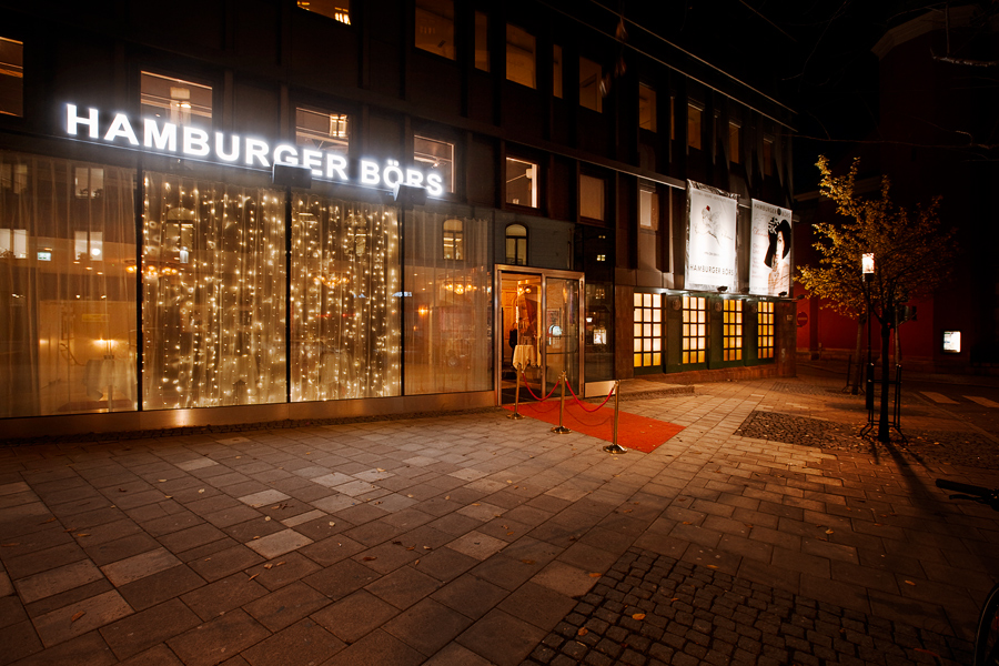 Entré